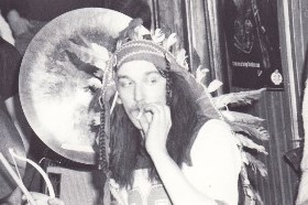 Sulla Bratke (bürgerlich Jürgen Bratke) als Schlagzeuger der Schwobarockgruppe Schwoißfuaß. Aufgenommen 1980. Bratke trägt den für ihn typischen indianischen Kopfschmuck, der sein Markenzeichen bei Bühnenauftritten war.